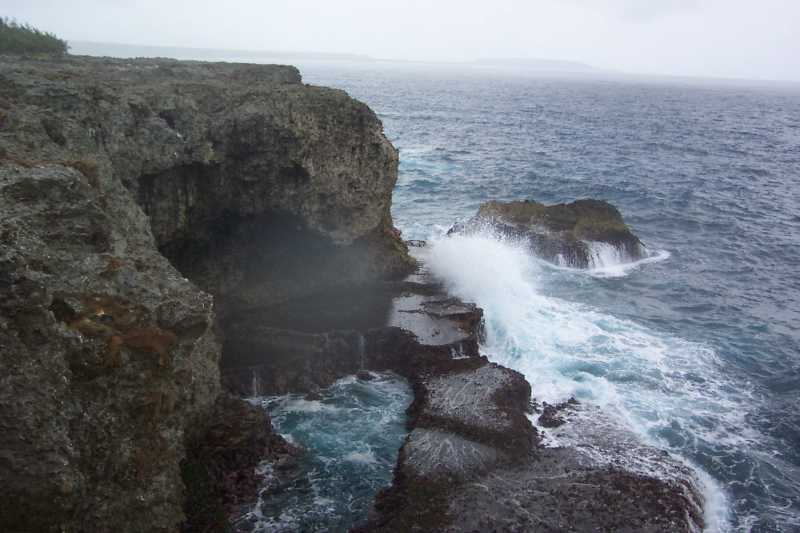 Nouvelle-Calédonie - Lifou - les falaises de Xodre photo personnelle libre de droits - free license picture